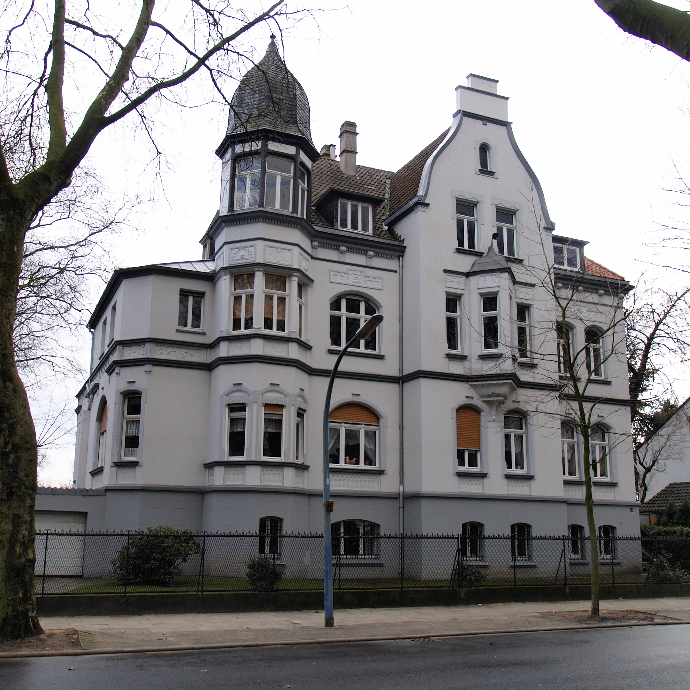 Luisenstr. 28 in Herne, Wohnhaus, Denkmal in Herne-Horsthausen, Ansicht von N